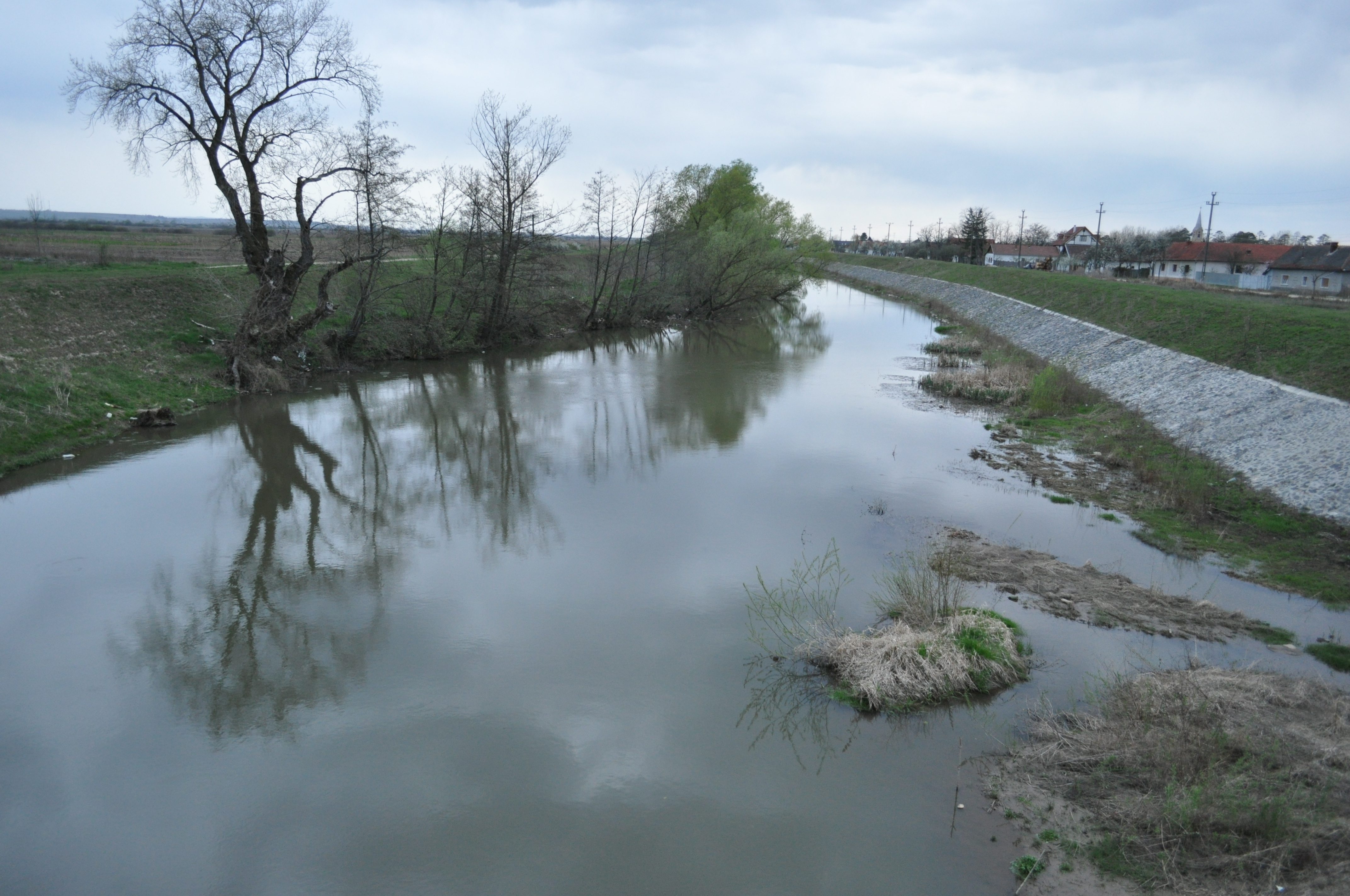 Râul Bega la Bethausen, Timiș